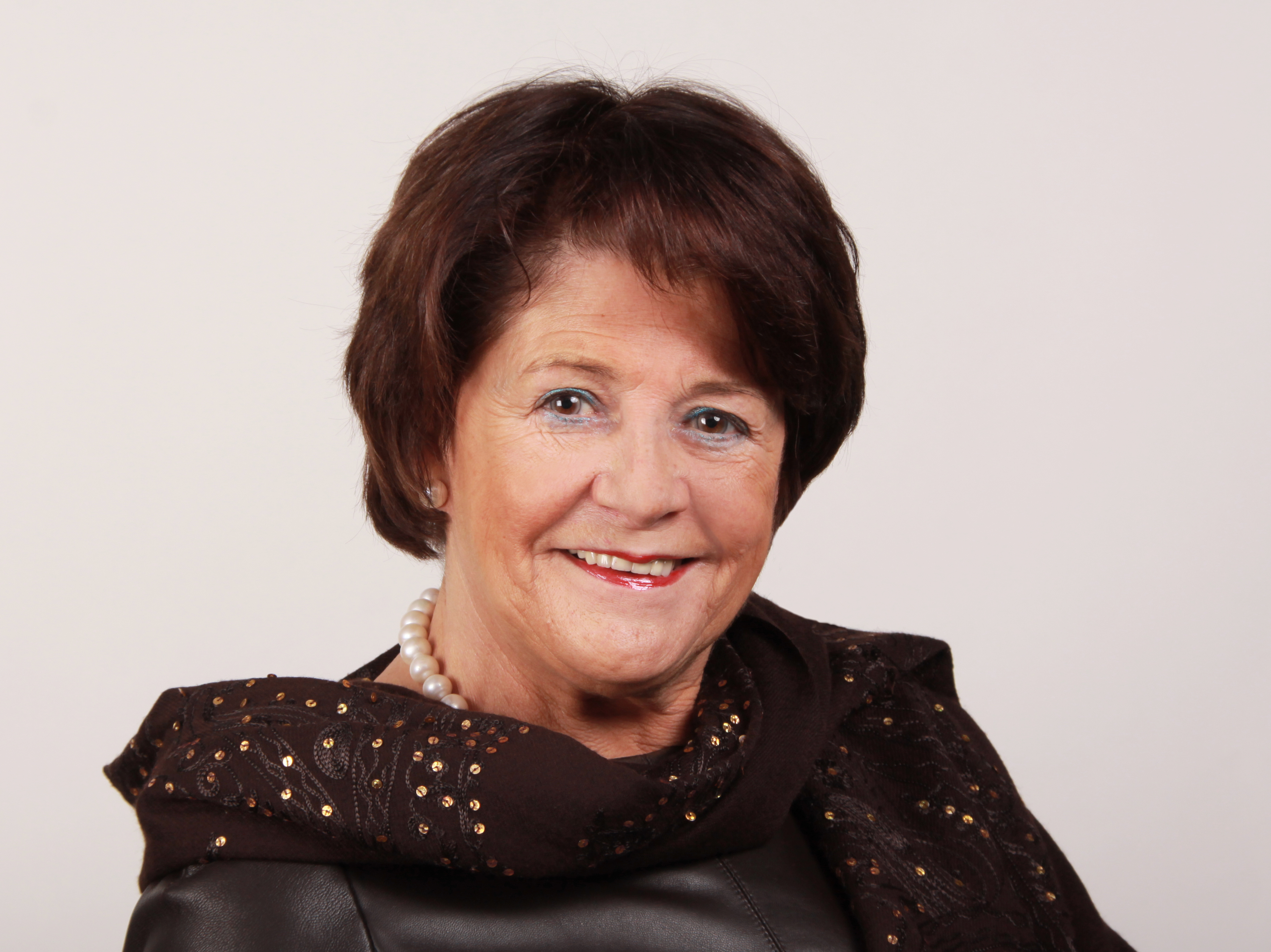 Abgeordnete/r Europaparlament